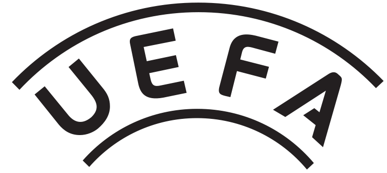 Uefa logo 2013 in Intro Official 2012-2013